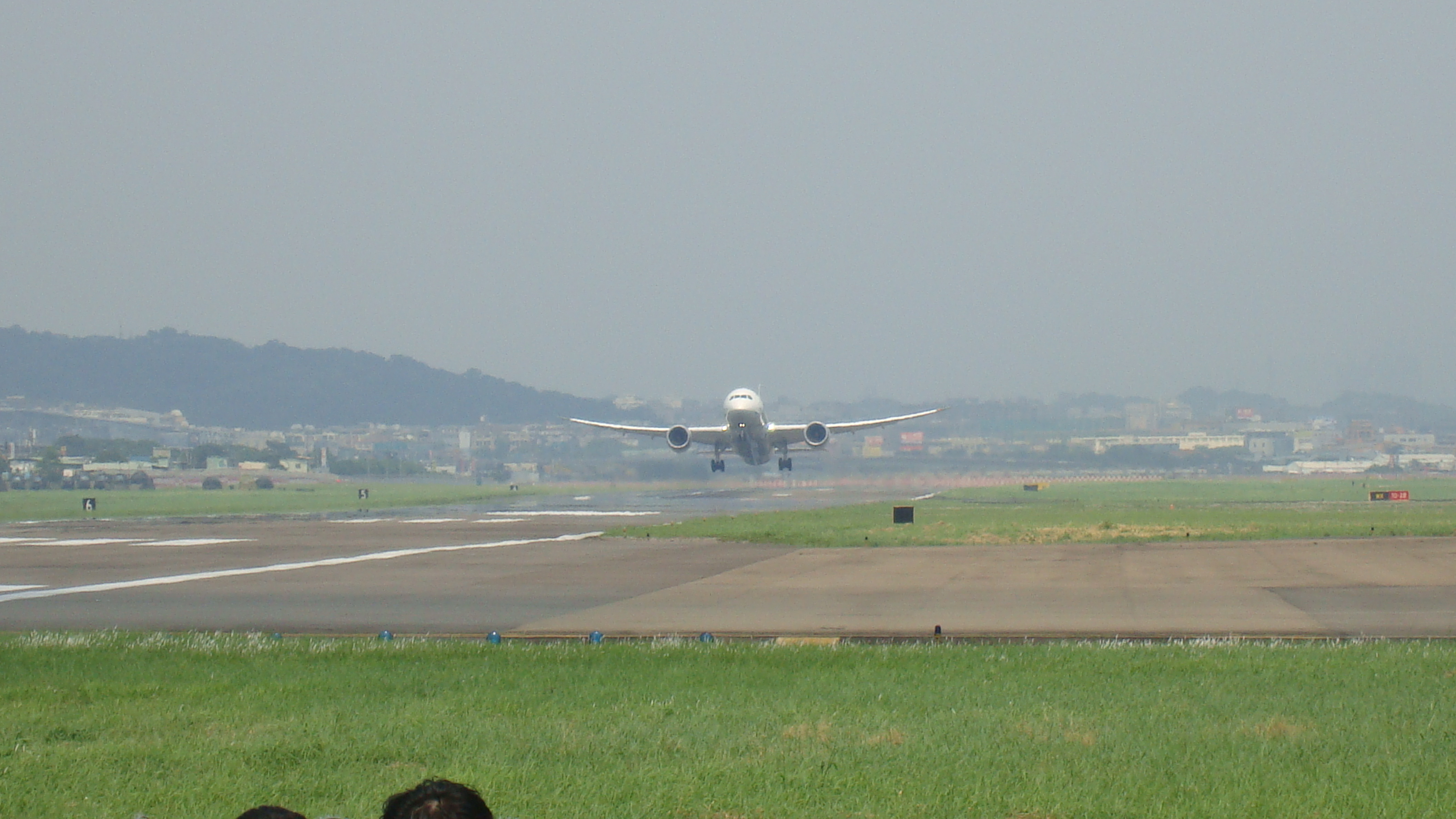 中文（台灣）: 2013年6月1日下午，全日空波音787 JA808A自松山機場28跑道起飛離場。